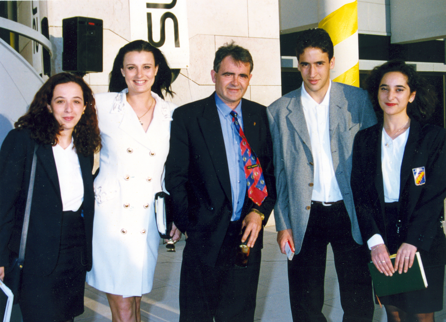 Durante la inauguración de la nueva sede del Comité Olímpico Español